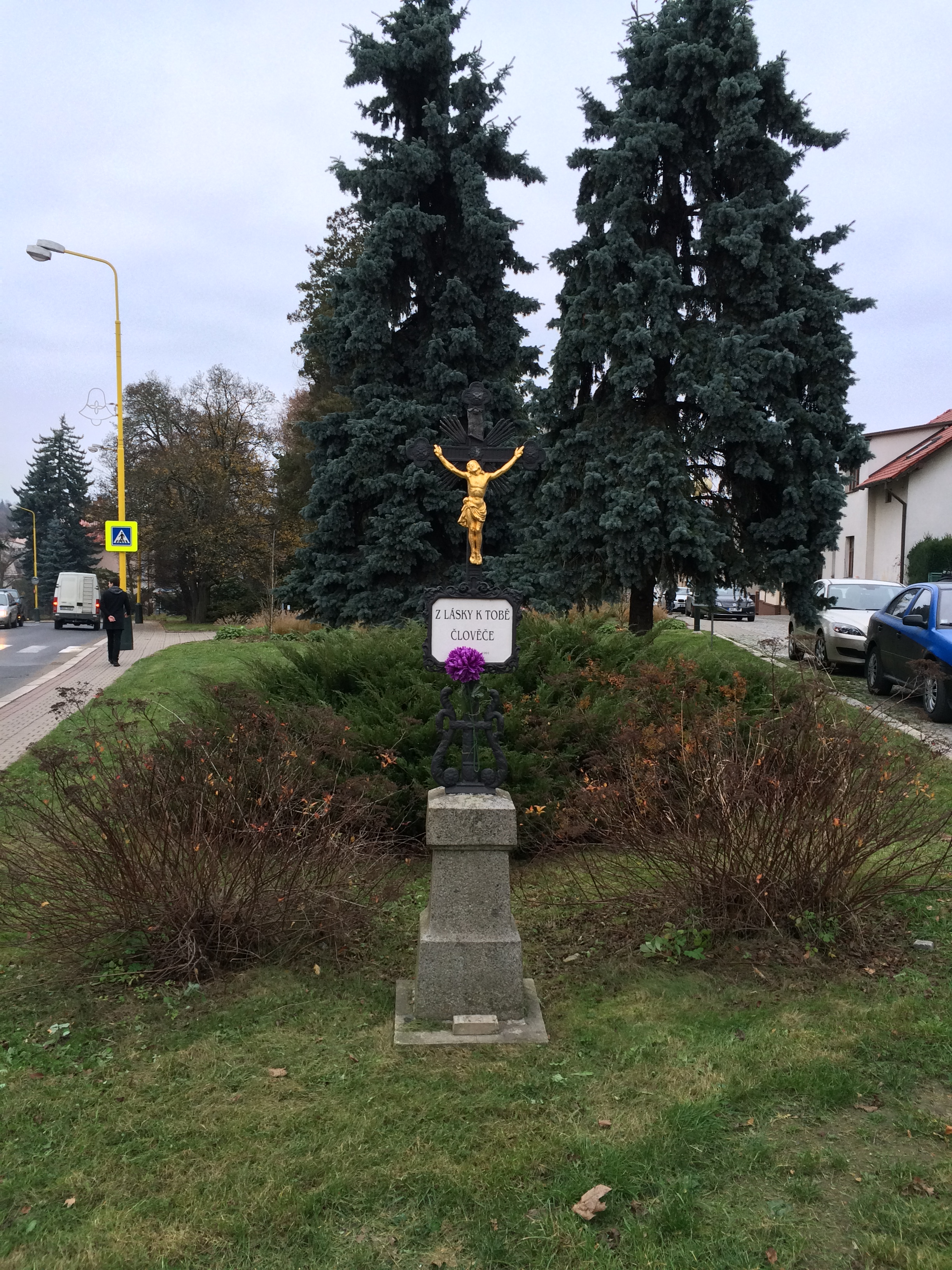 Krucifix v parku Antonína Švehly mezi ulicemi 17. listopadu a cesta Svobody v Říčanech.